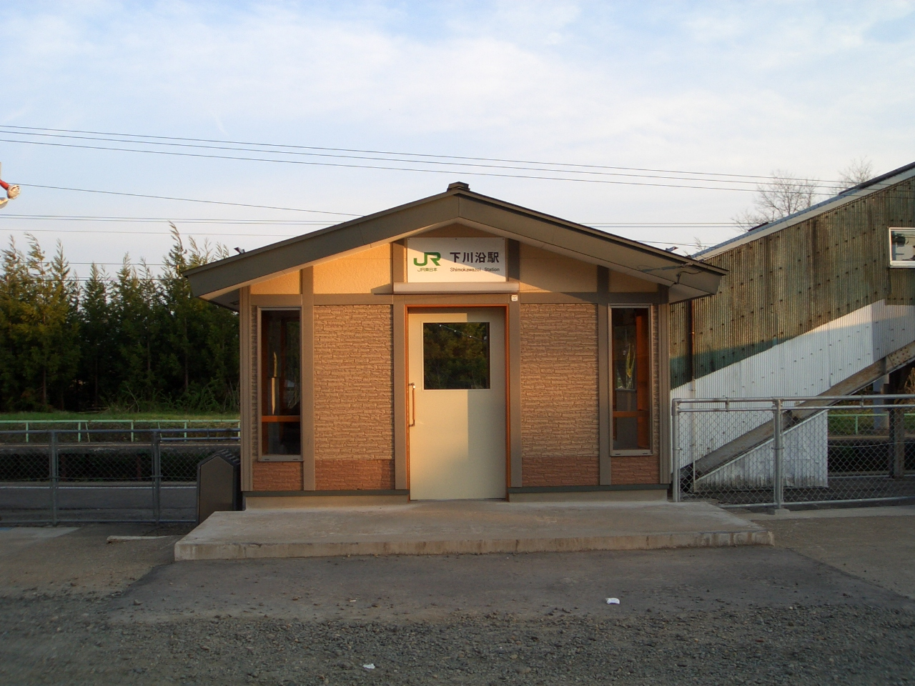 秋田県大館市に所在するJR東日本の下川沿駅の写真